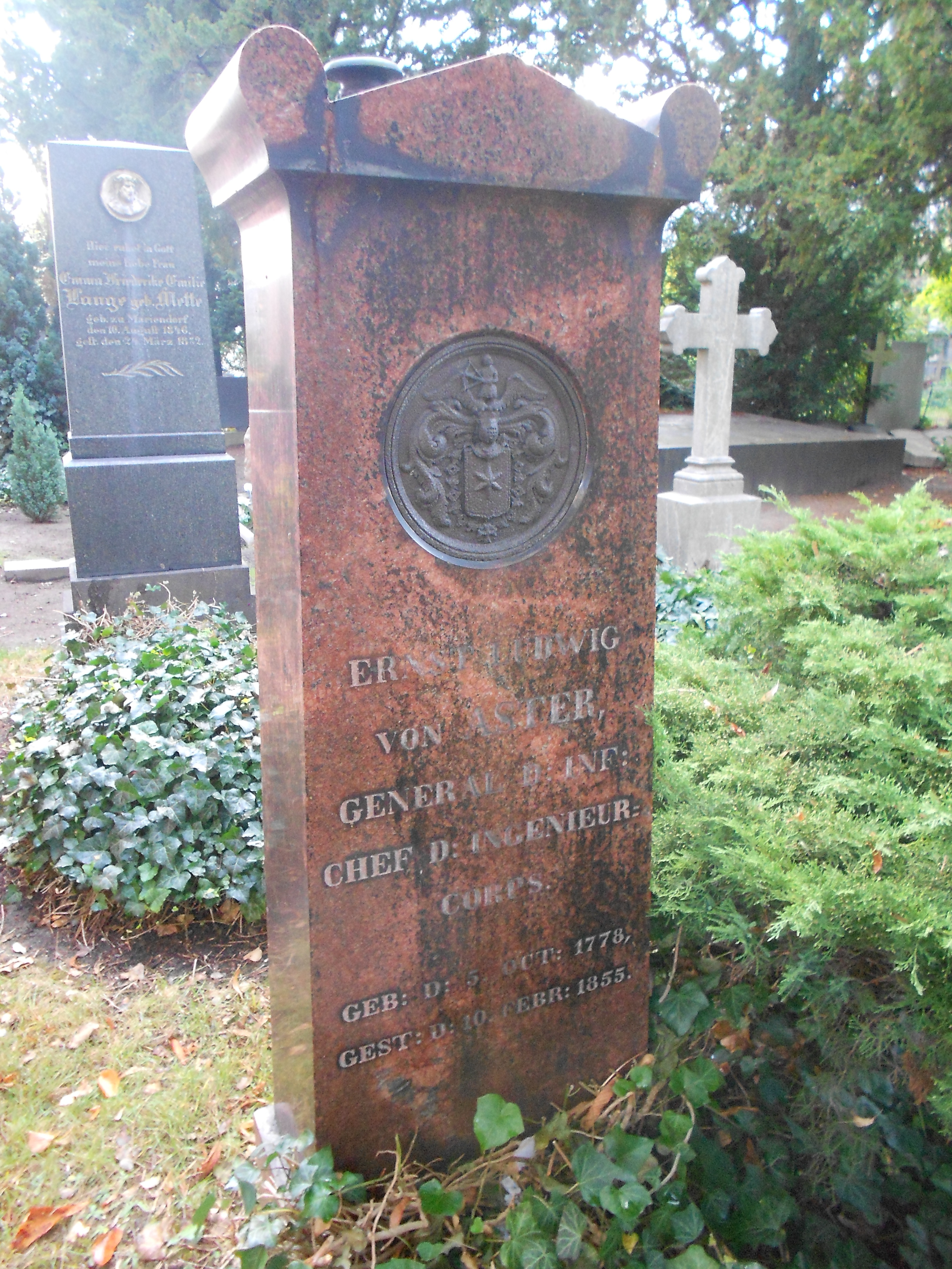 Grabstein des preußischen Generals Ernst Ludwig von Aster (1778–1855) im Friedhof Berlin-Schöneberg, Nahaufnahme